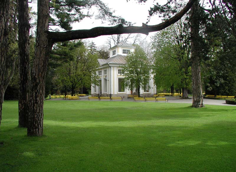 Musikpavillon im Innsbrucker Hofgarten, Bundesgärten Innsbruck 2006, zur Verfügung gestellt von Ing. Herbert Bacher This media shows the remarkable cultural object in the Austrian state of Tyrol listed by the Tyrolean Art Cadastre with the ID 116170. (on tirisMaps, pdf, more images on Commons)